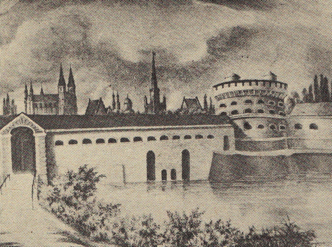 Mała Śluza i Fort Haake w Poznaniu w latach 40. XIX wieku.